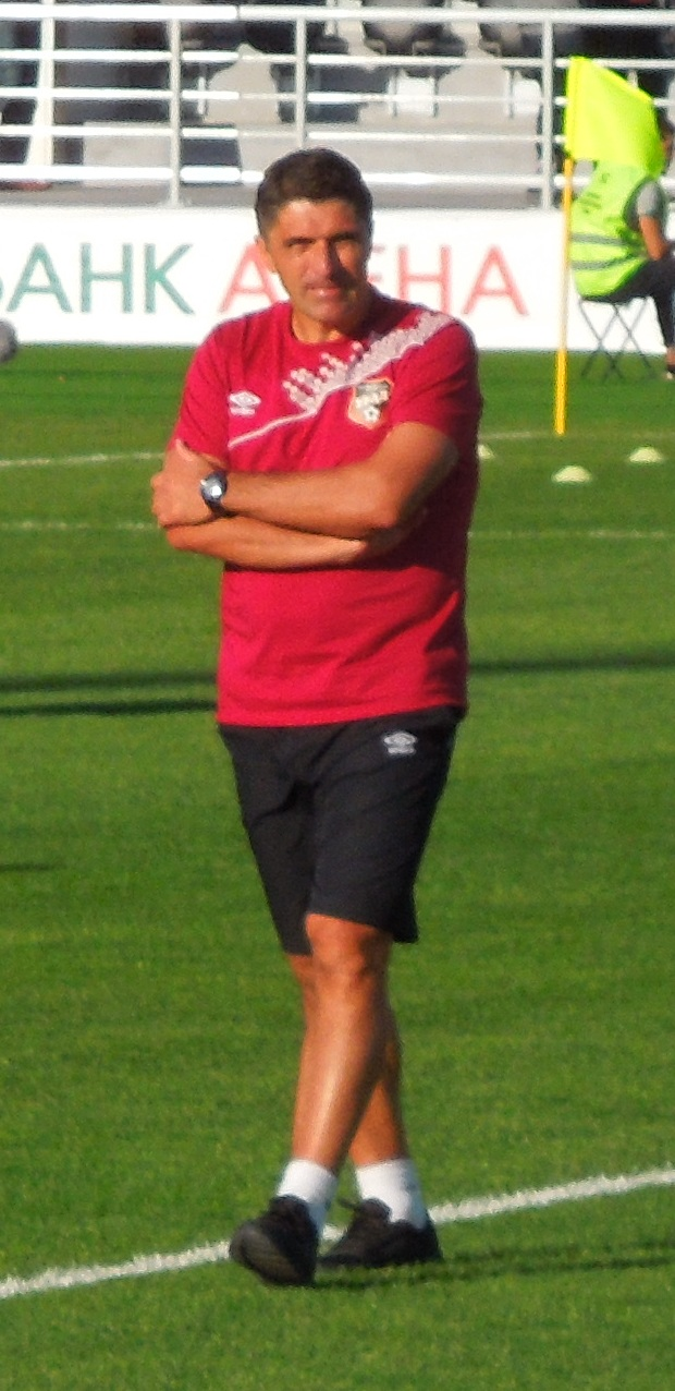 Юрий Матвеев, 8 августа 2015